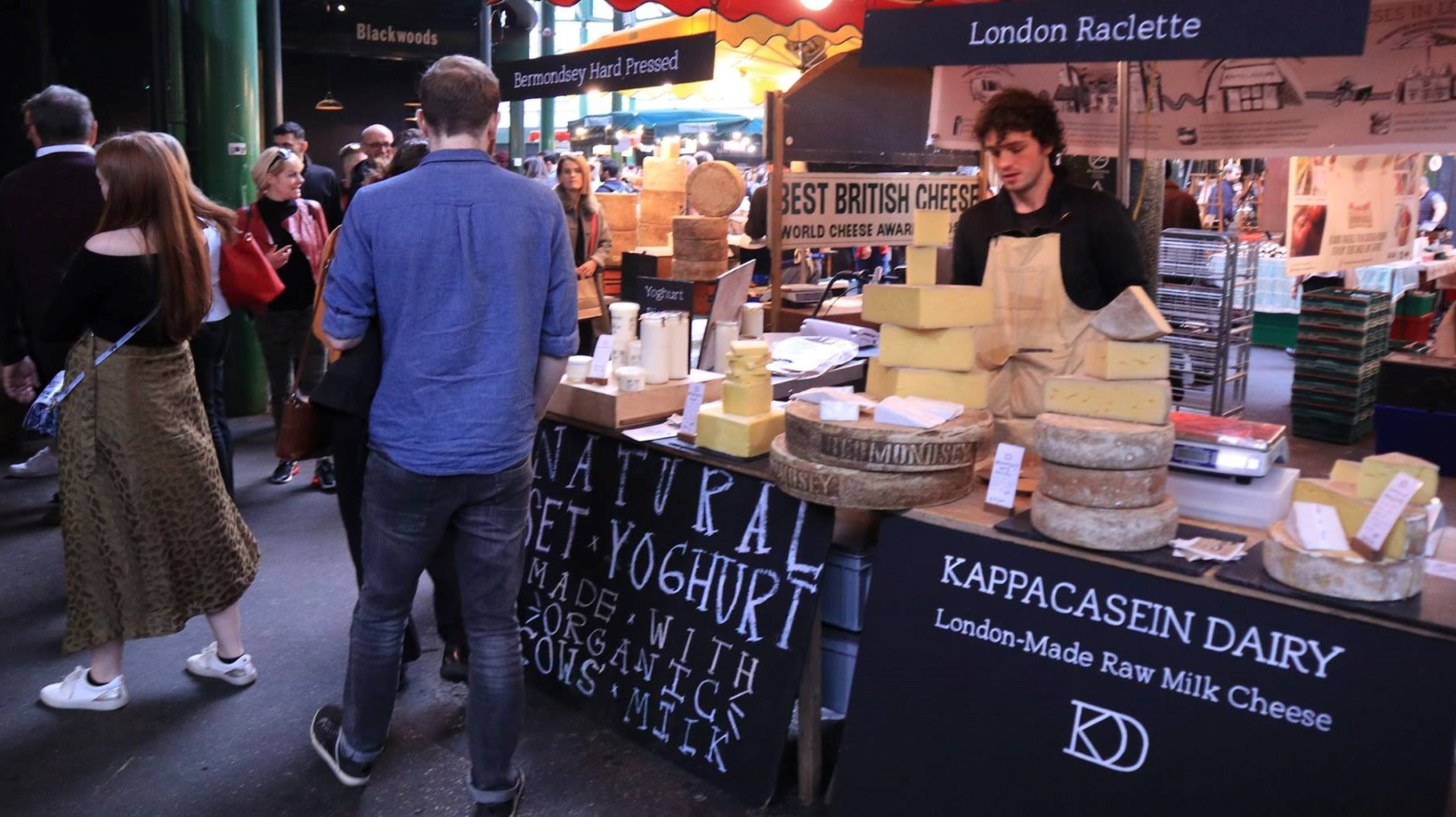 Na tržišti jsou k zakoupení krom jiného jedinečné předměty, které vyrábějí samotní prodejci, kteří prodávají své výrobky přímo zákazníkům, mnohdy výrobek vzniká na stánku, před jejich očima